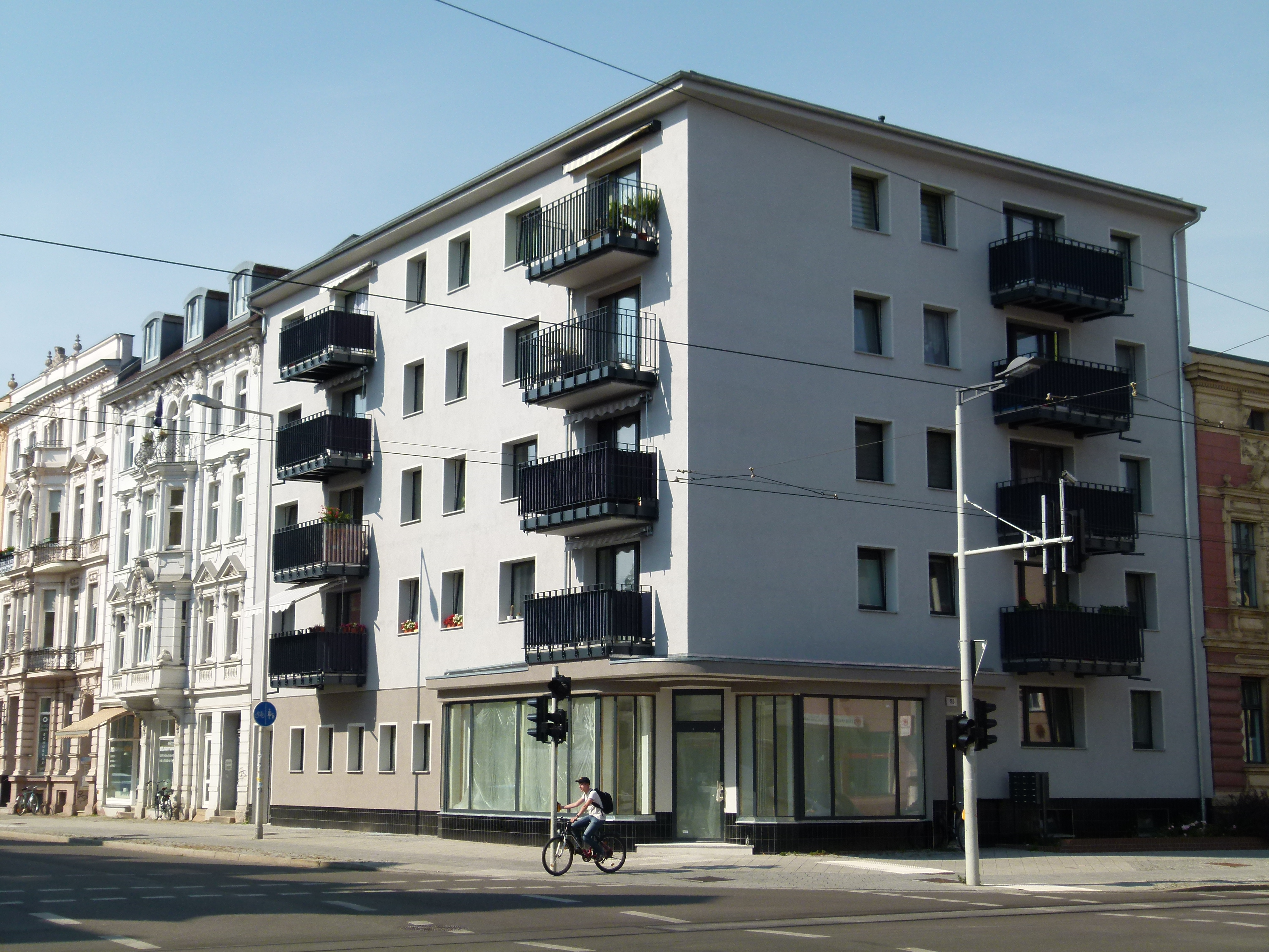 58 Bahnhofstraße 2014